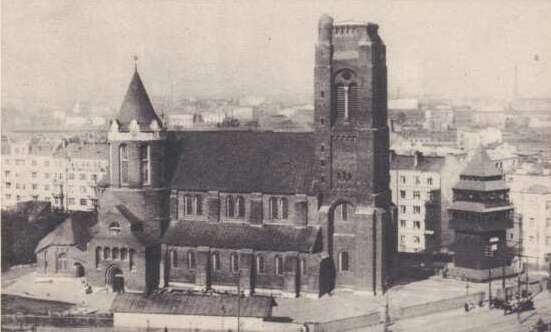 Eglise Saint Jacques, Varsovie.